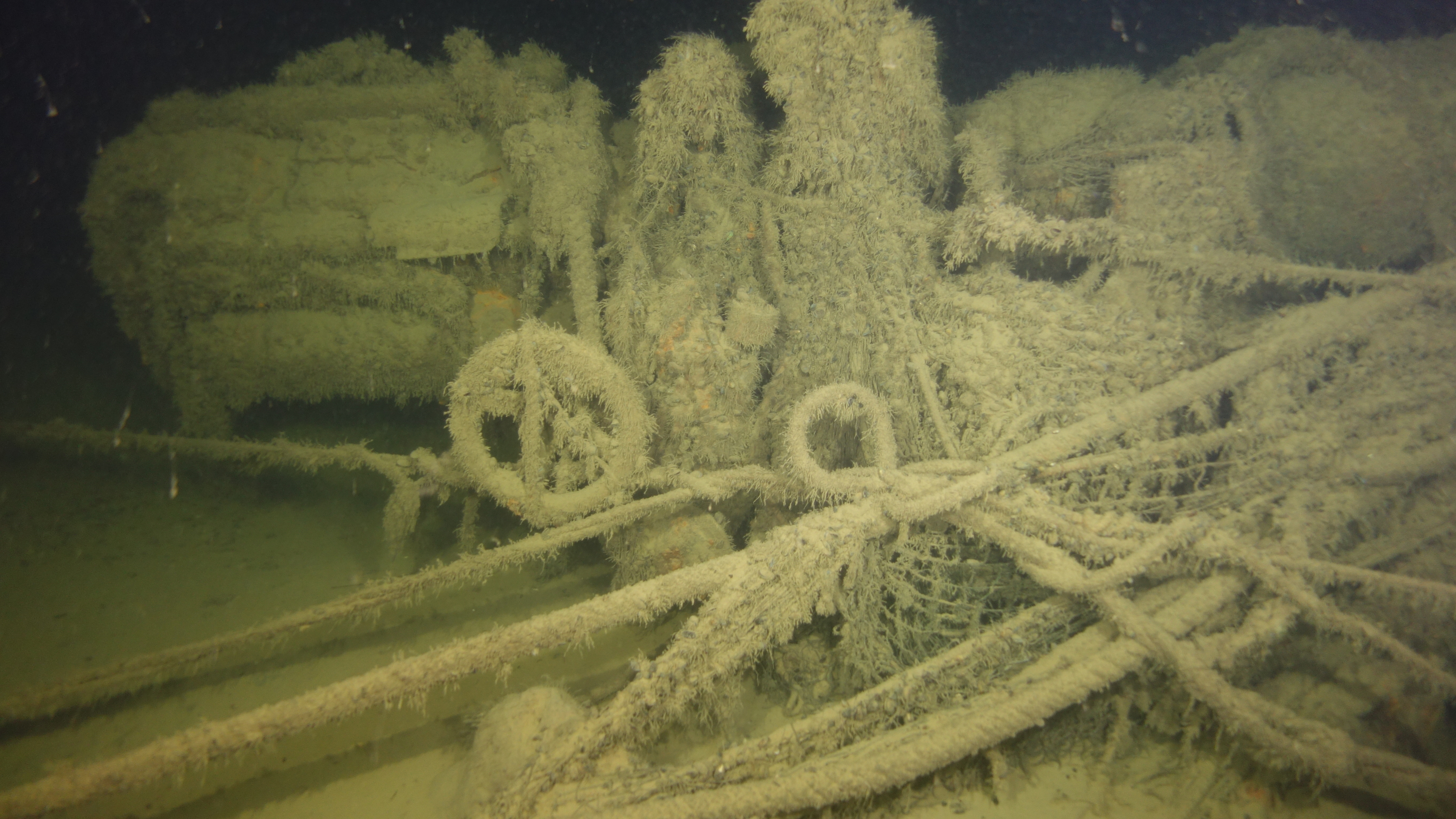 Laevavrakk "Kazanets". Suurtükk ahtris.